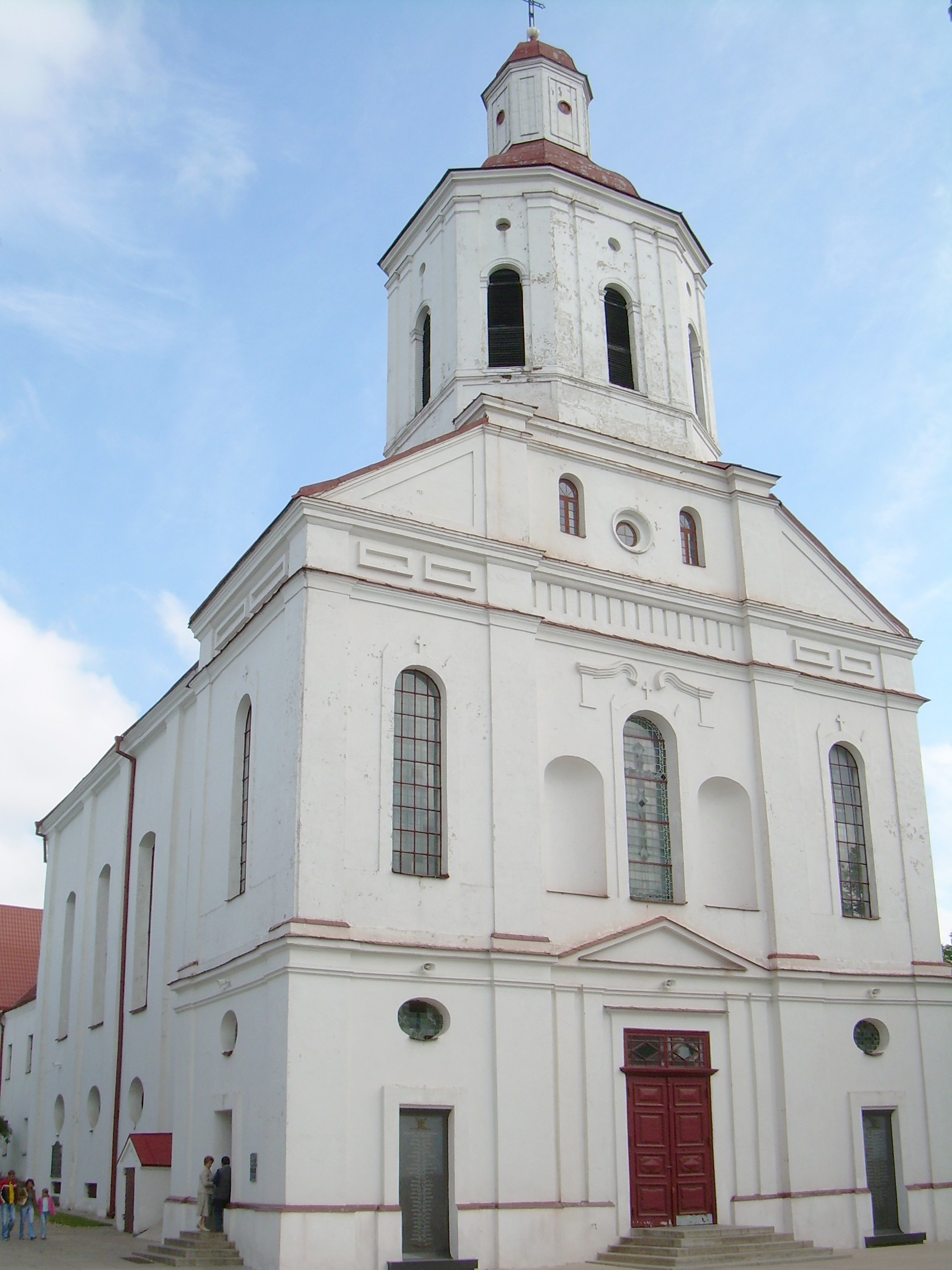 Telšių Šv. Antano Paduviečio katedra